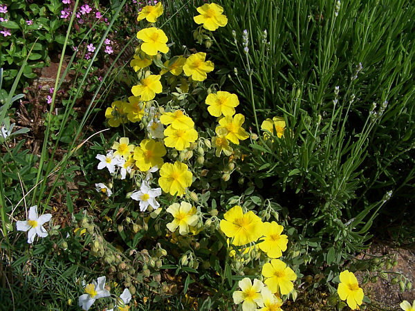 Plante semi-ligneuse de 10 à 20cm qui se rencontre dans le sud de l'Espagne et du Portugal, sur sol calcaire, en zone faiblement boisée et basse montagne.